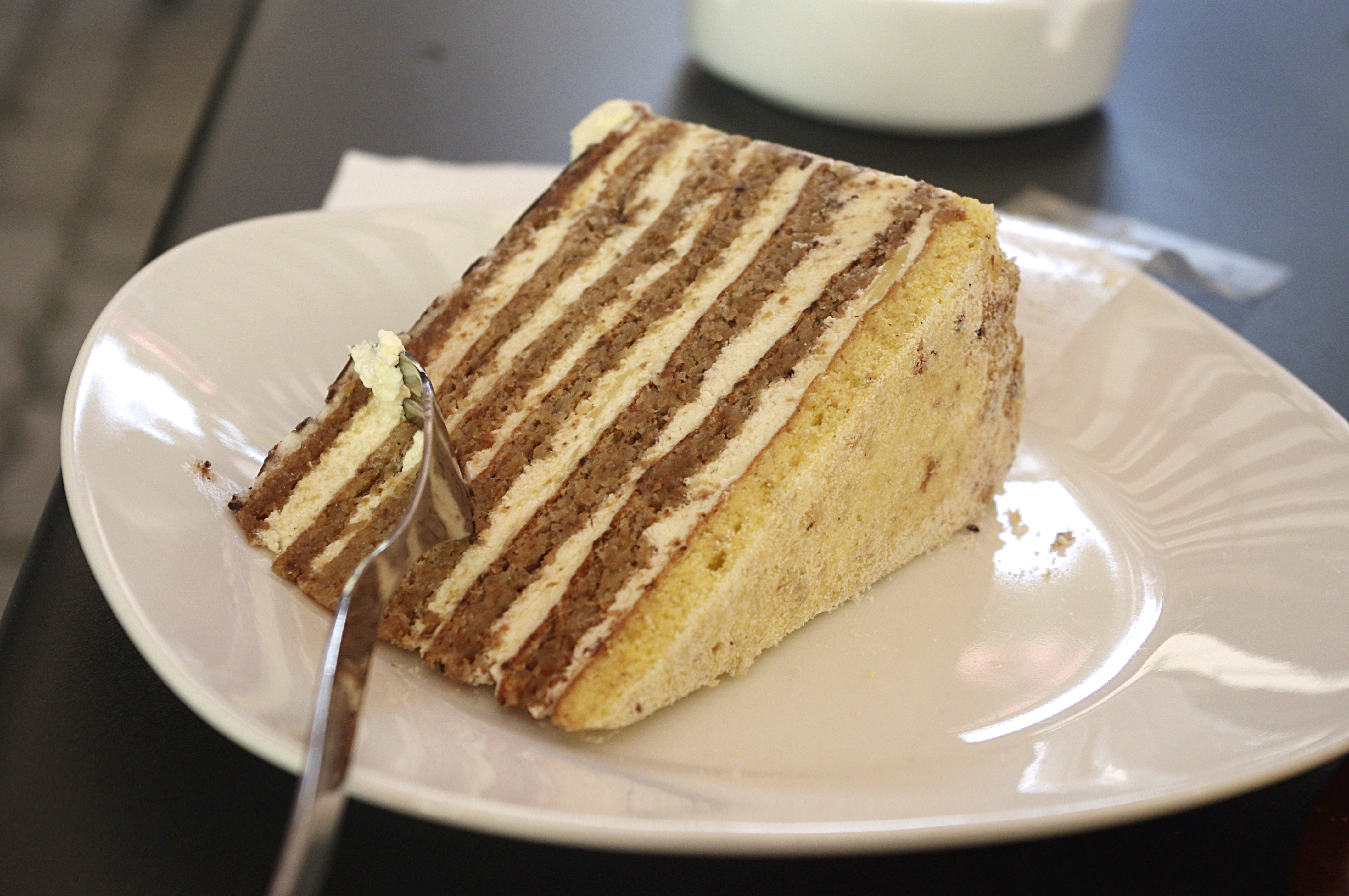 Eszterhazy-Torte in einer Soproner Konditorei.